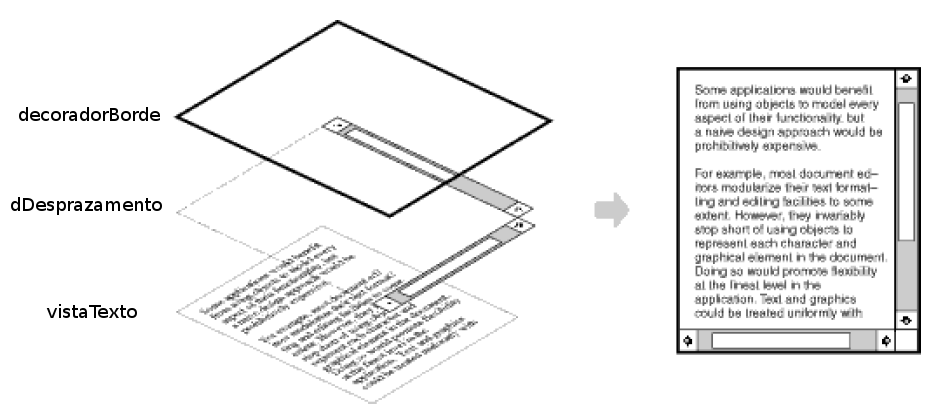 Exemplo visual do uso de decoradores